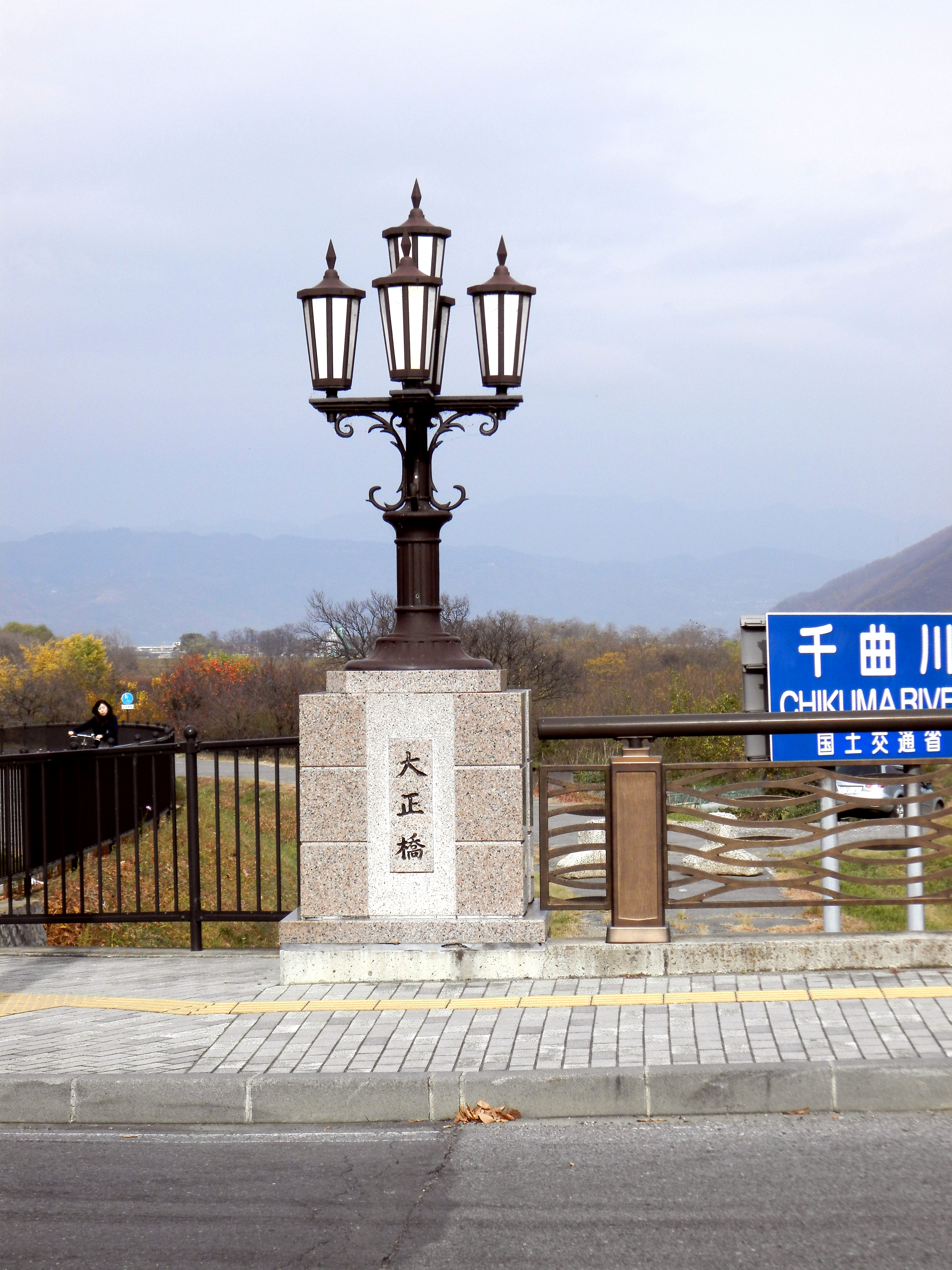 千曲川に架かる大正橋